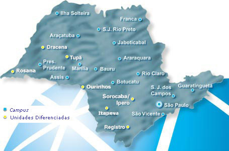 Campis Unesp